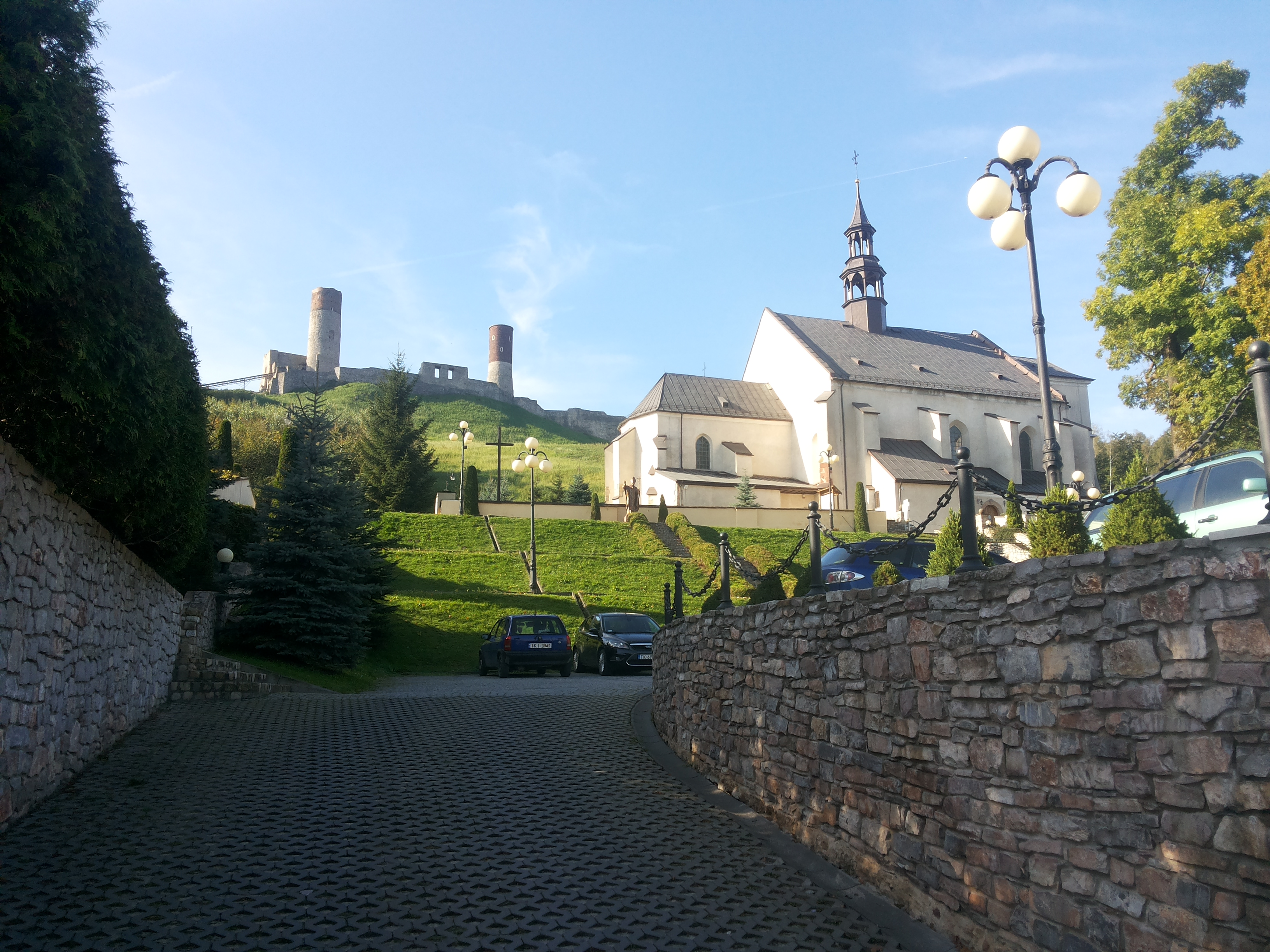 Chęciny, kościół par. pw. św. Bartłomieja (z kaplicą Fodygów), 1325 r., pocz. XVII w., lata 1830-1840